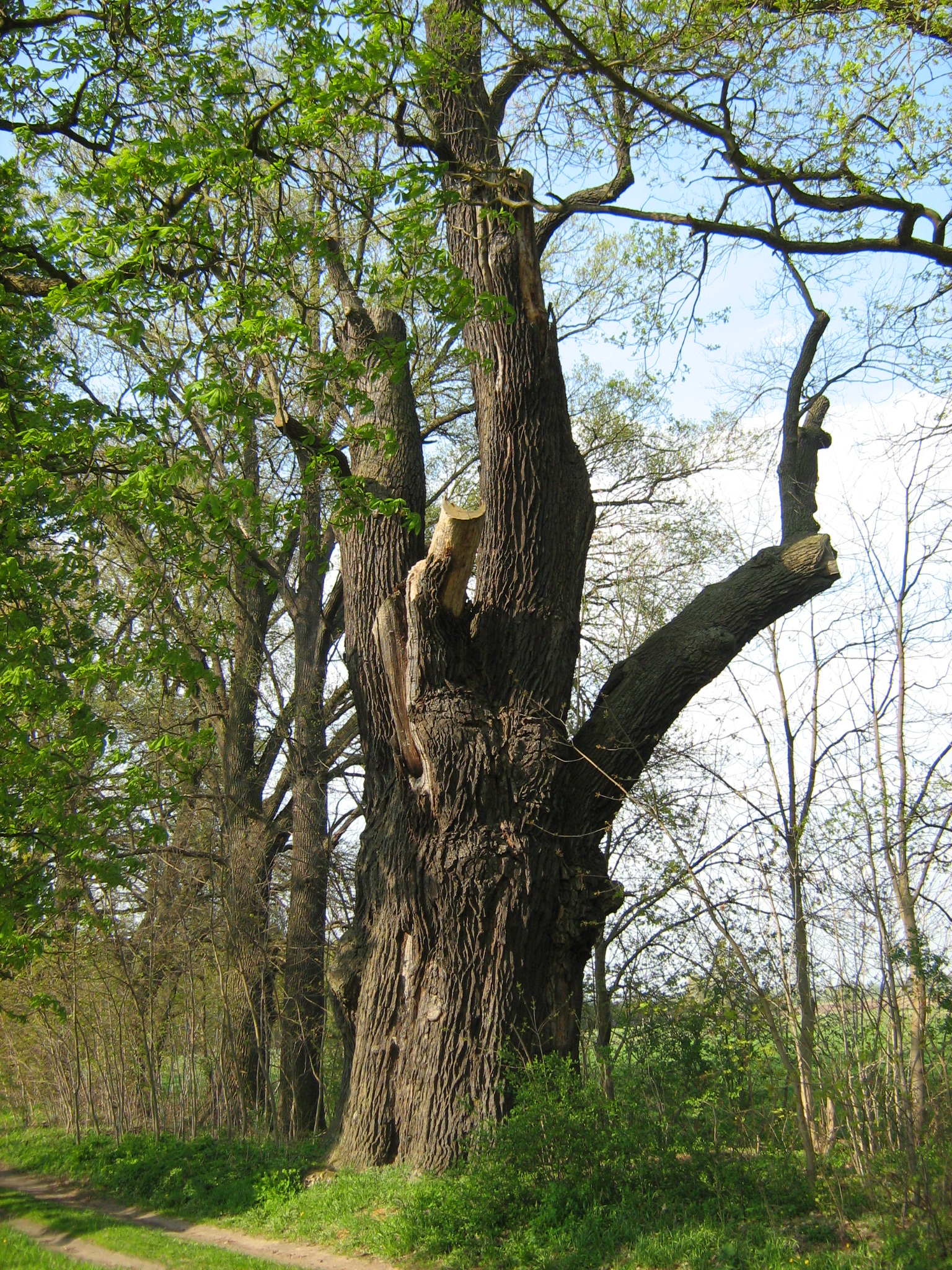 Naturdenkmal Krügersdorfer Eichen – Alte Eiche bei Krügersdorf